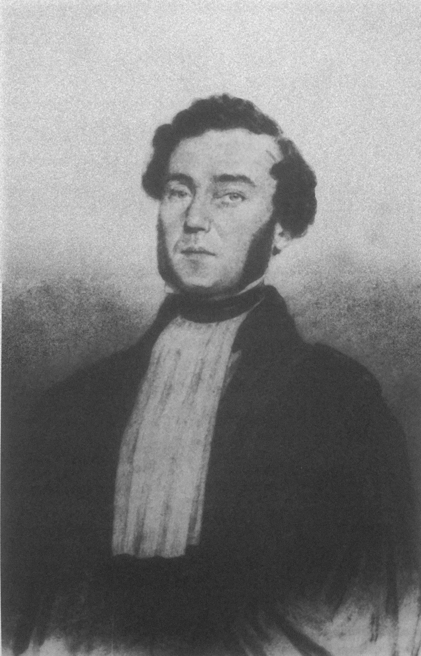 Vital Dutour, Procureur impérial de Lourdes en 1858, au moment des apparitions à Bernadette Soubirous.